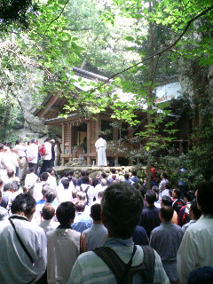 世界遺産《「神宿る島」宗像・沖ノ島と関連遺産群》- 沖ノ島沖津宮、2007年度現地大祭参加時に撮影 UNESCO World Heritage 《Sacred Island of Okinoshima and Associated Sites in the Munakata Region》- Okitsumiya, Okinoshima